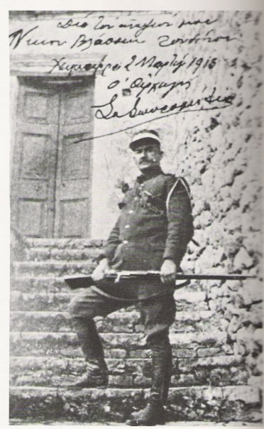 Ο Αρχηγός της Χειμάρρας Σπύρος Σπυρομήλιος μπροστά από το σπίτι του στο Κάστρο